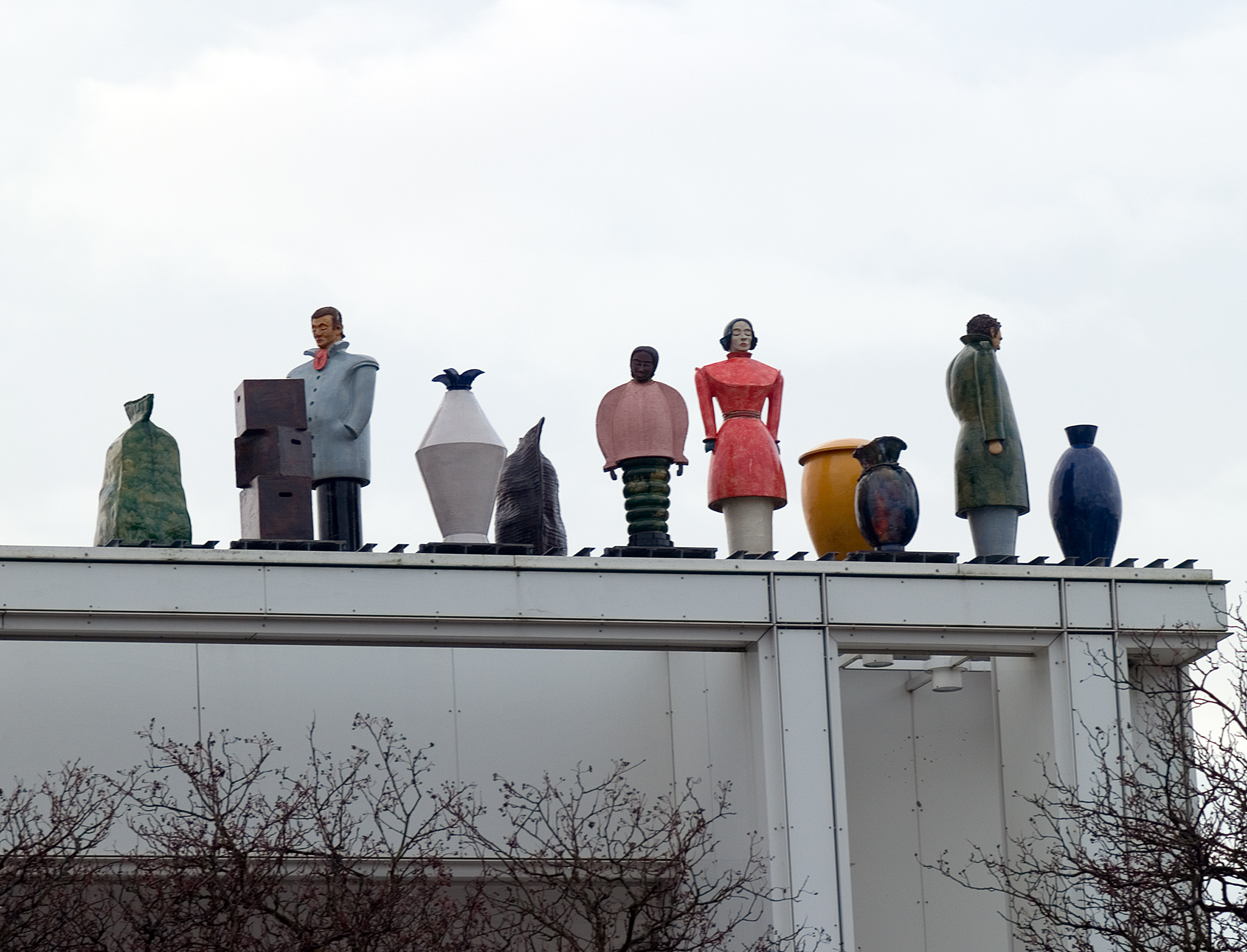 Die Fremden glasierte Keramik von Thomas Schütte, auf der Musik- und Kongreßhalle in Lübeck